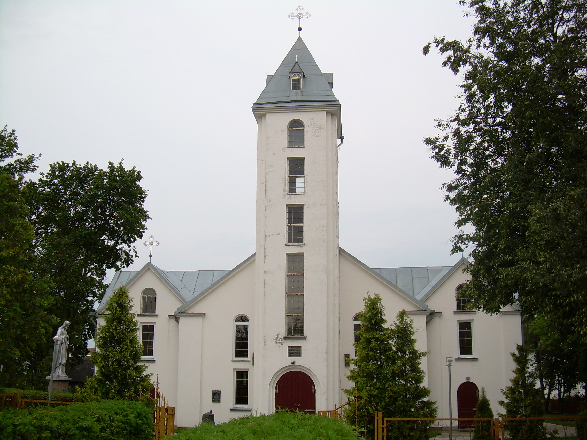 Radviliškio Švč. Mergelės Marijos Gimimo bažnyčia